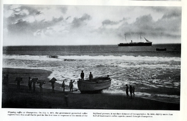 Fotografia tomada el 1o. de Julio del año 1871, apenas unos dias despues de haberse oficializado a Champerico como Puerto. En ese entonces aun no habia ninguna instalacion portuaria, como muelle, bodegas o aduanas